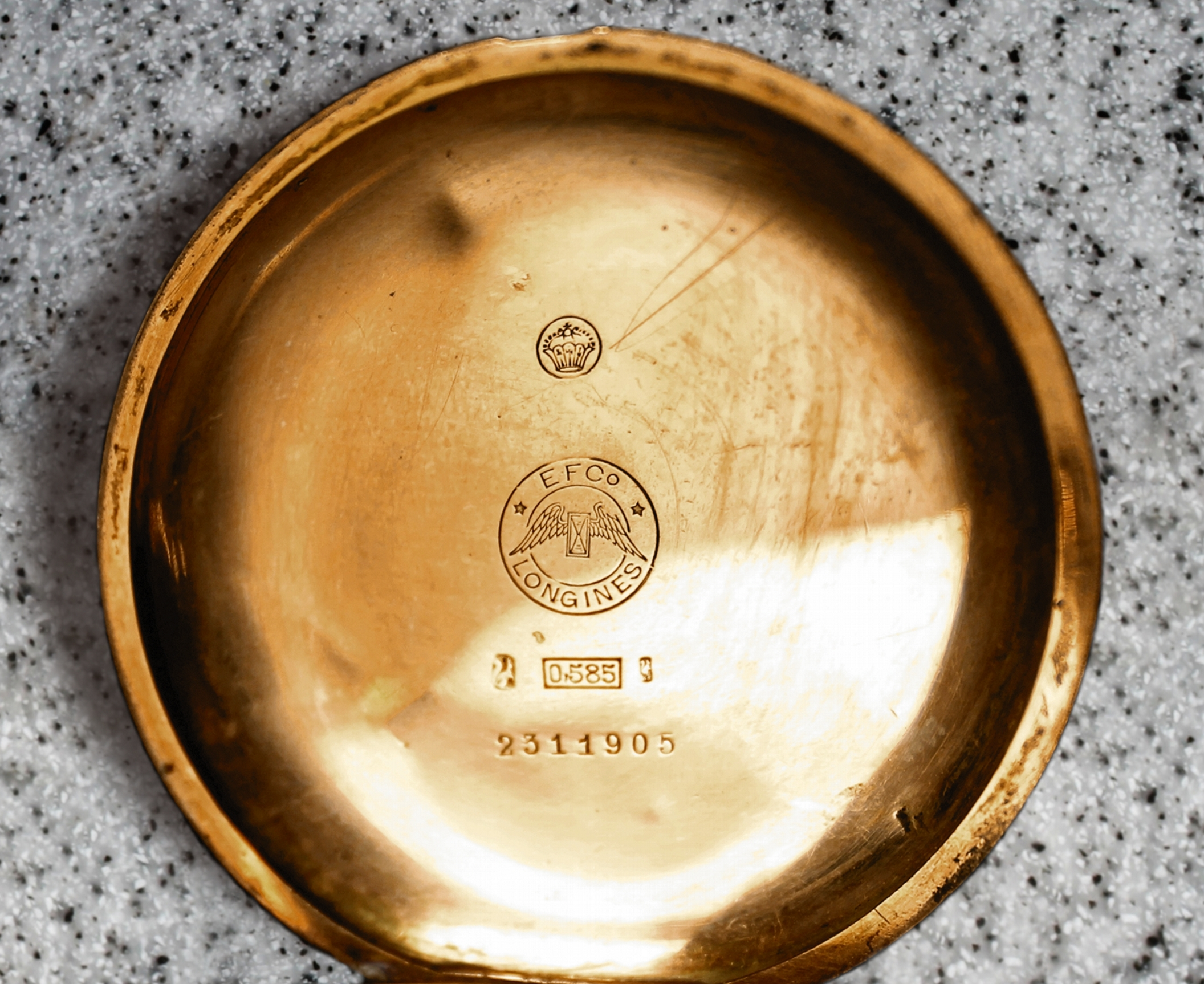 Innendeckel einer Longines-Taschenuhr mit Logo und Seriennummer